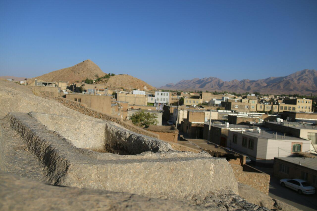 استودان/ کتیبه سنگی/ وحوض دختر گبر